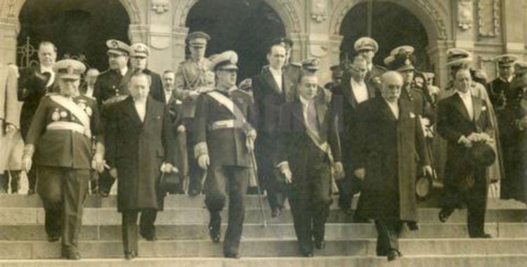 El presidente de la Nación, Juan Domingo Perón, junto al presidente de Chile Gabriel González Videla, el vicepresidente Hortensio J. Quijano y el gobernador de Tucumán, Carlos Domínguez, descienden de las escalinatas de la Casa de Gobierno de Tucumán, el 9 de julio de 1947.